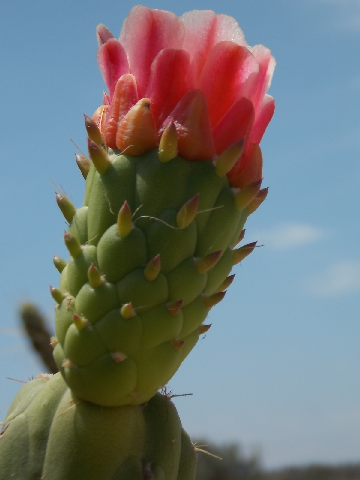 Cactaceae 01